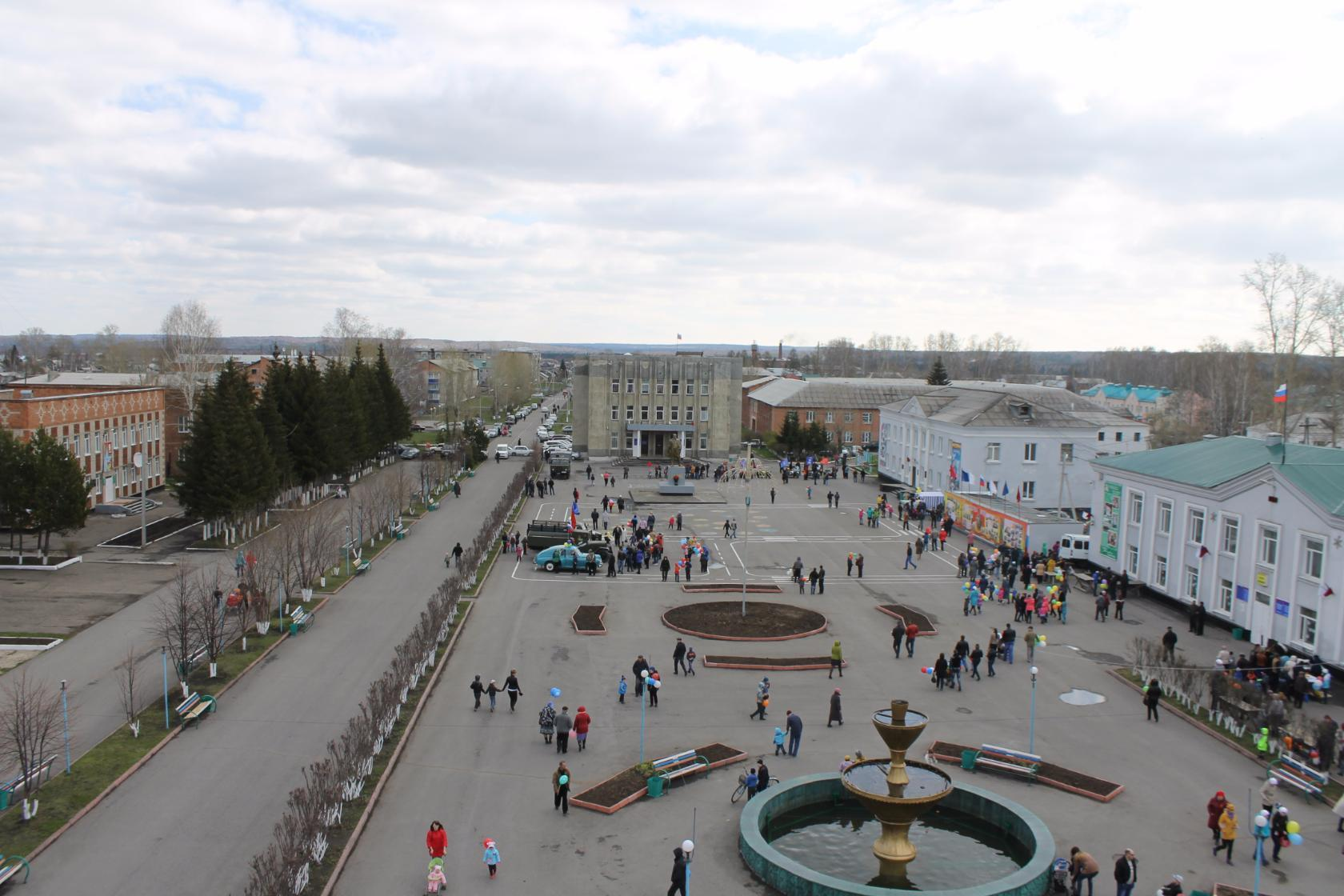 Тяжинский